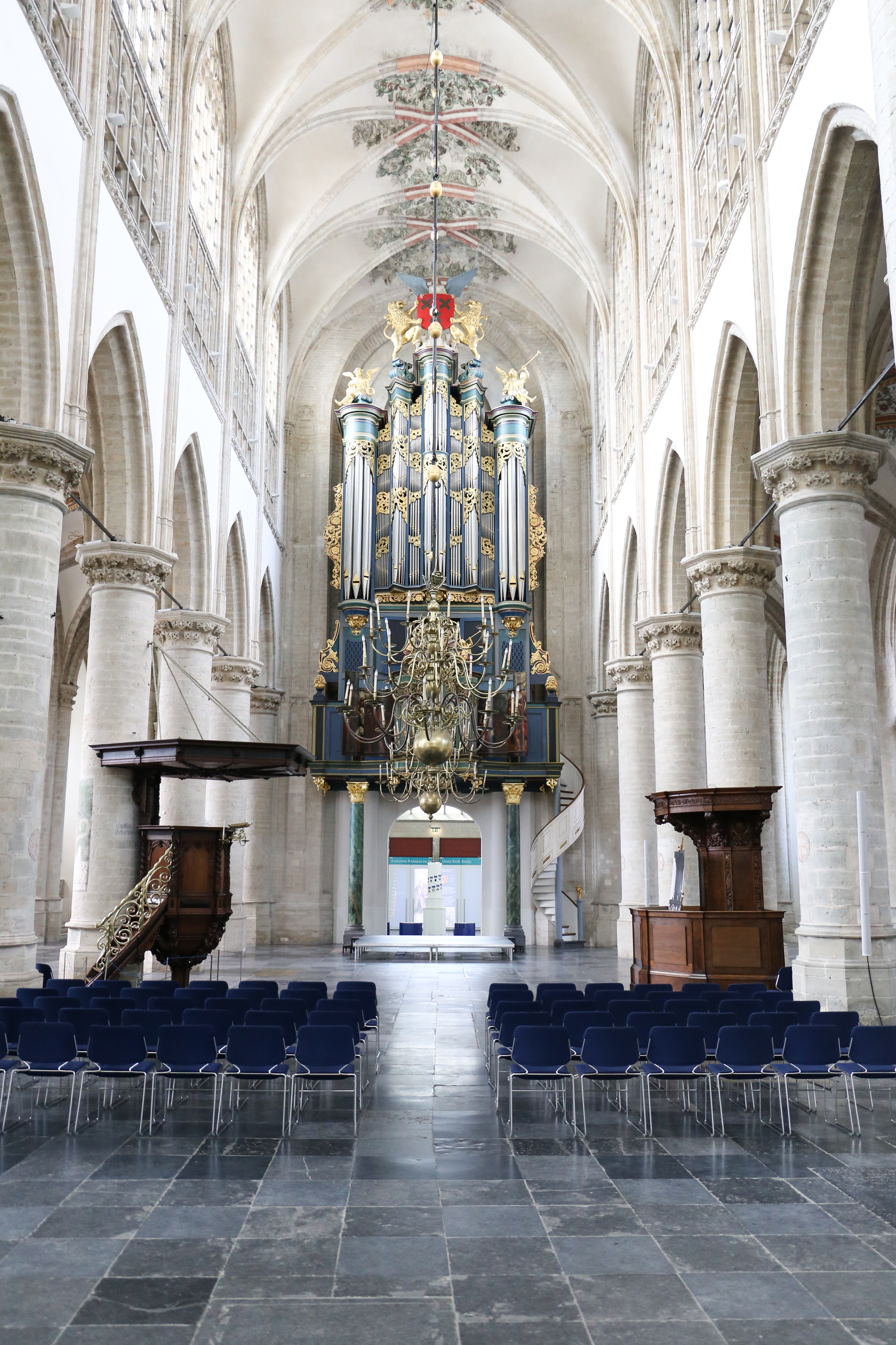 Interieur Grote of Onze-Lieve-Vrouwekerk in Breda